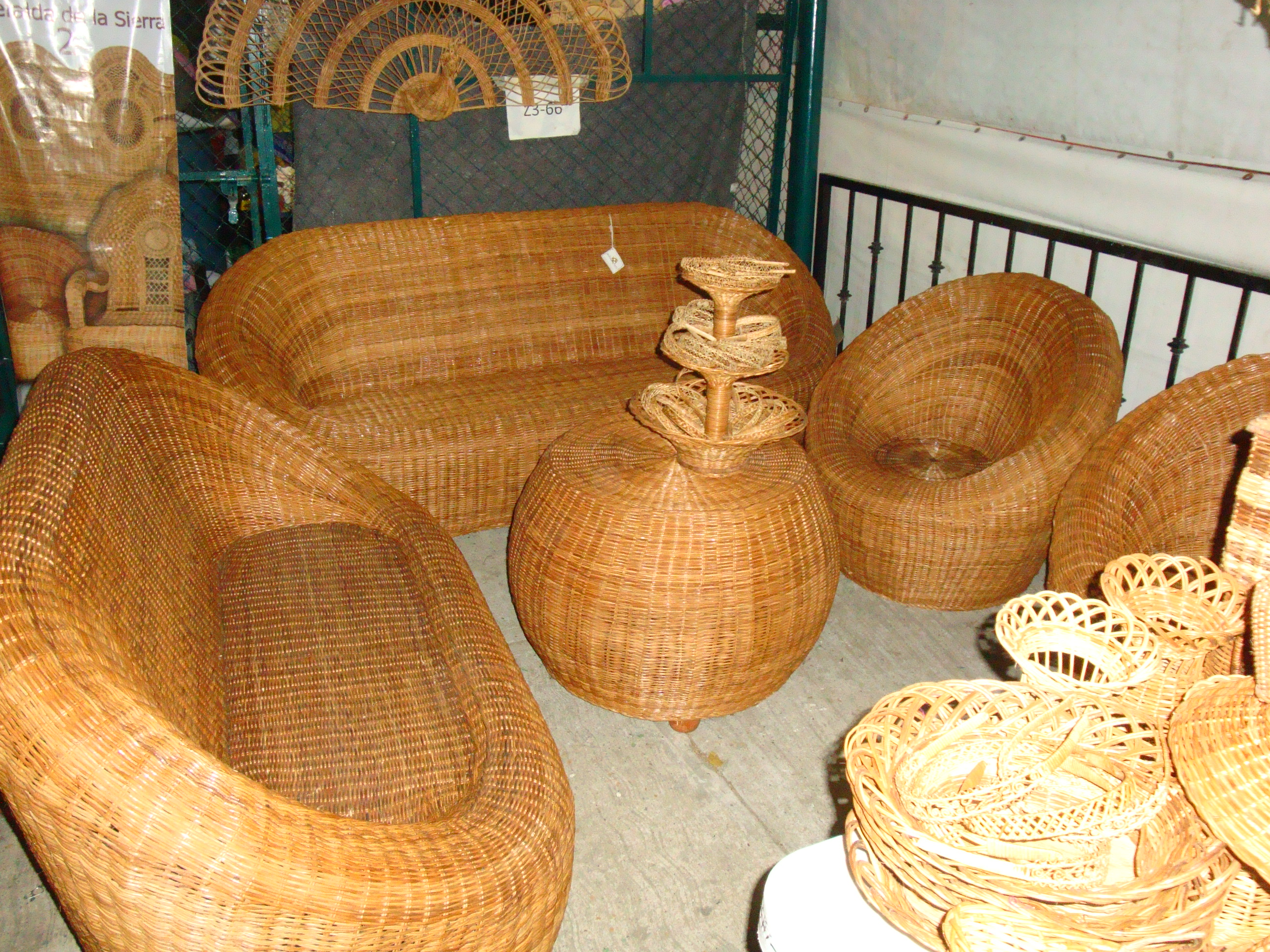 Muebles elaborados de ratán y mimbre. Artesanía del municipio de Tacotalpa.